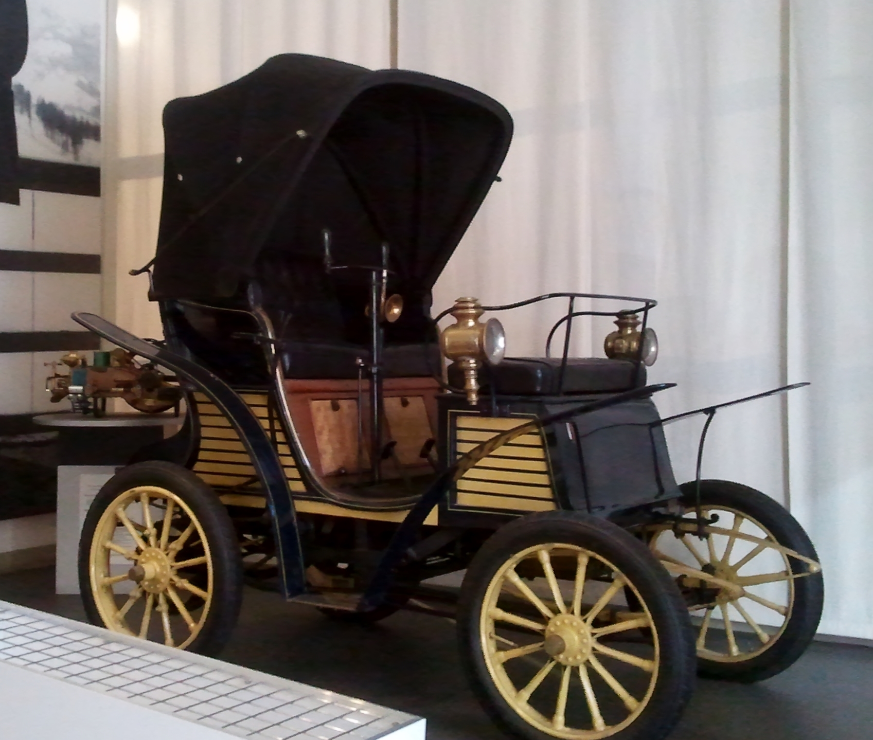 Fiat 4HP en el Centro Storico Fiat